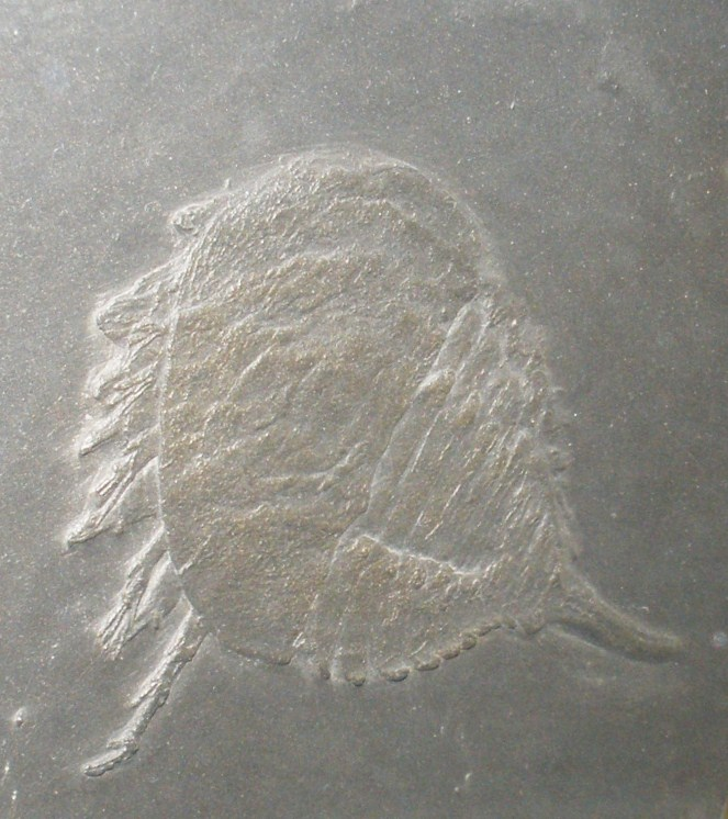 Fossil of Weinbergina, an extinct arthropod- Took the photo at Senckenberg Museum of Frankfurt